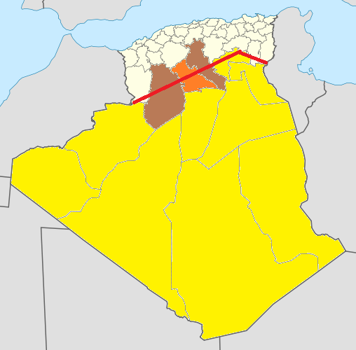 Carte svg ; En jaune : wilayas strictement sahariennes En orange : wilaya majoritairement saharienne En marron : wilayas minoritairement sahariennes